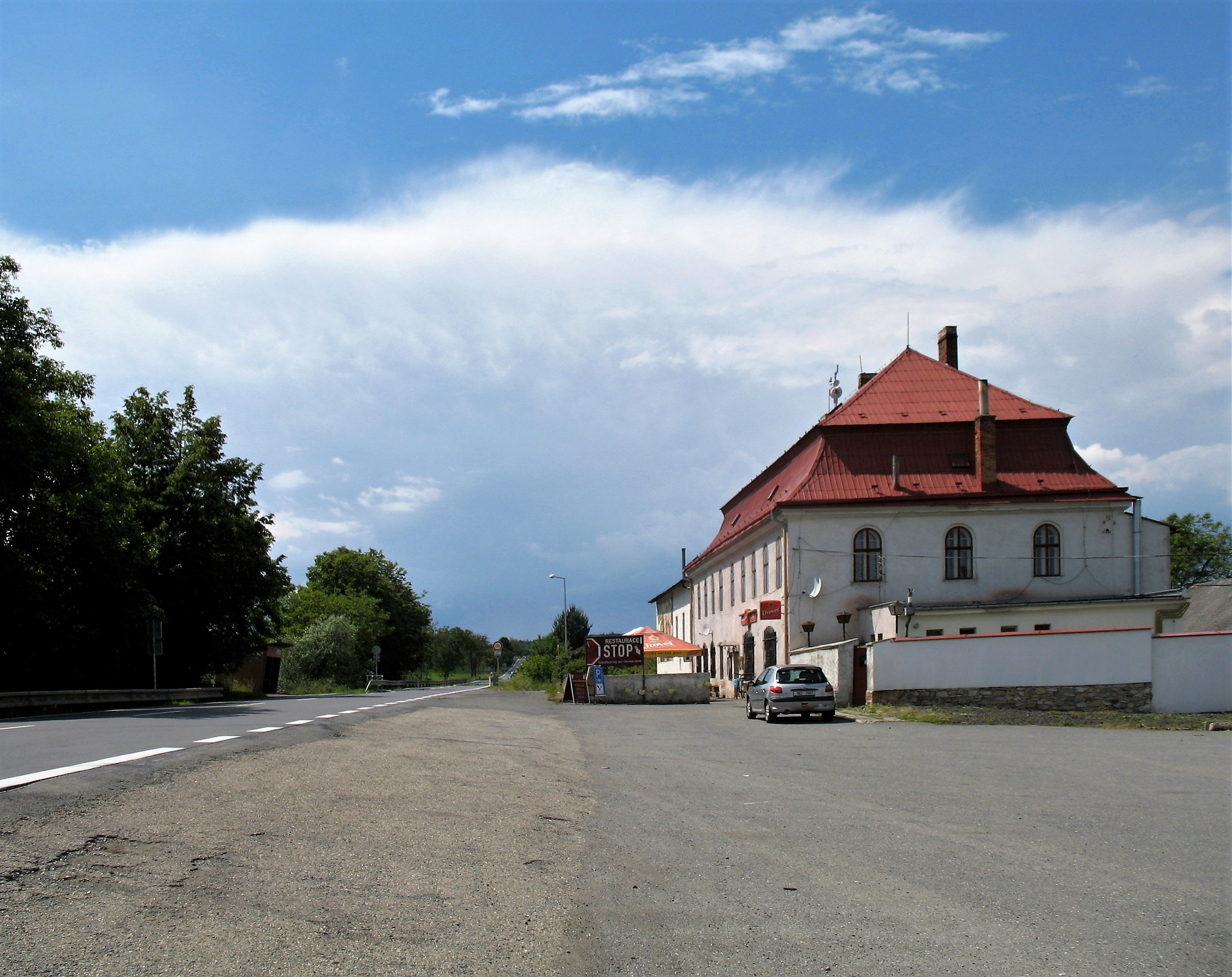 Restaurace Stop u silnice č. 635 v Sobáčově u Litovle